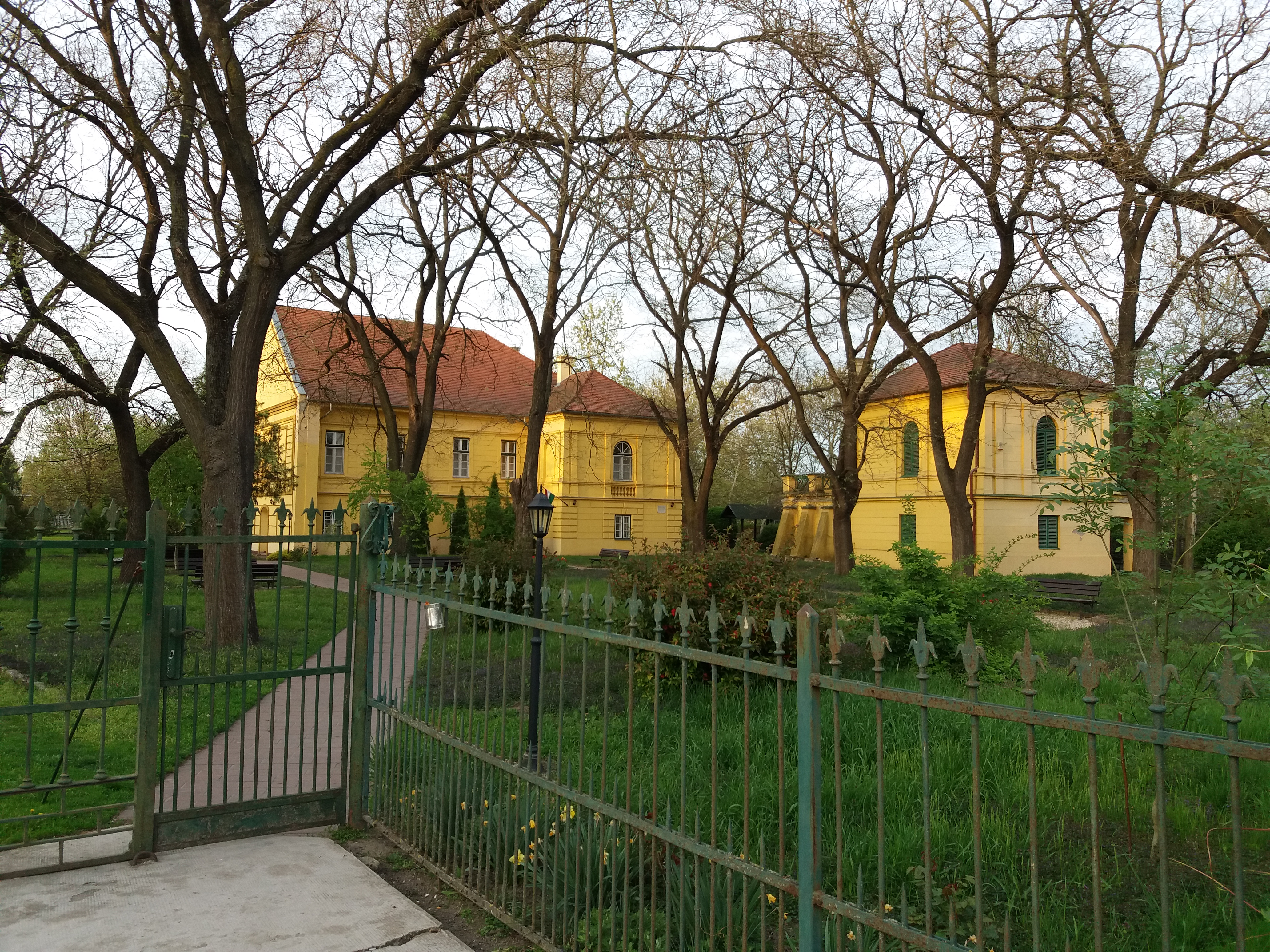 Leánykollégium, volt Kárász-kastély és kerti táncpavilon, klasszicista-neoreneszánsz-eklektikus, épült 1840 körül és 1890 körül. Ma a Péter András Gimnázium kollégiuma. azonosító: 2597 törzsszám: 9451